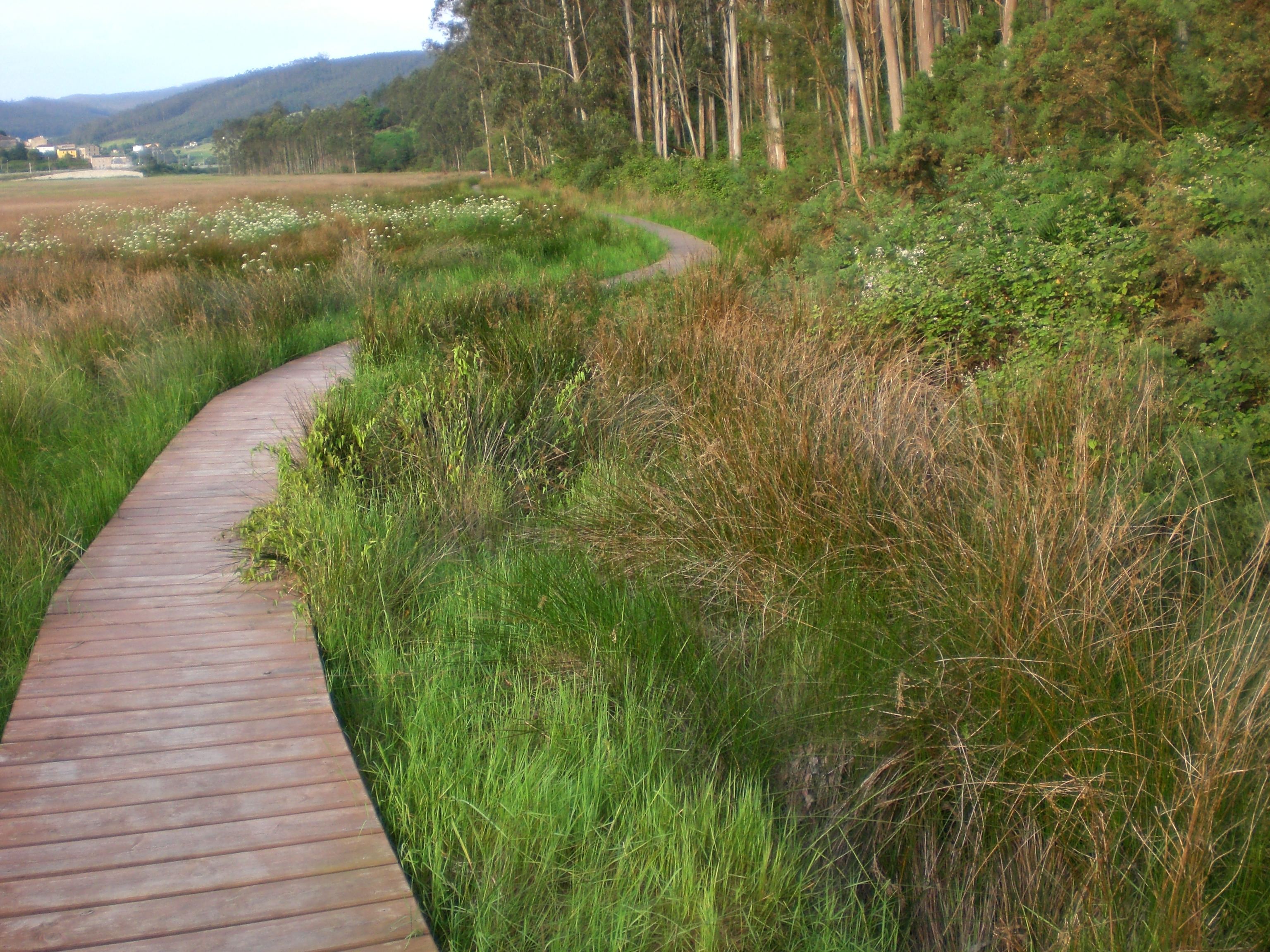 Tramo de la senda del Eo (Asturias)